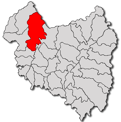 Categorie:Hărţi ale judeţului Covasna